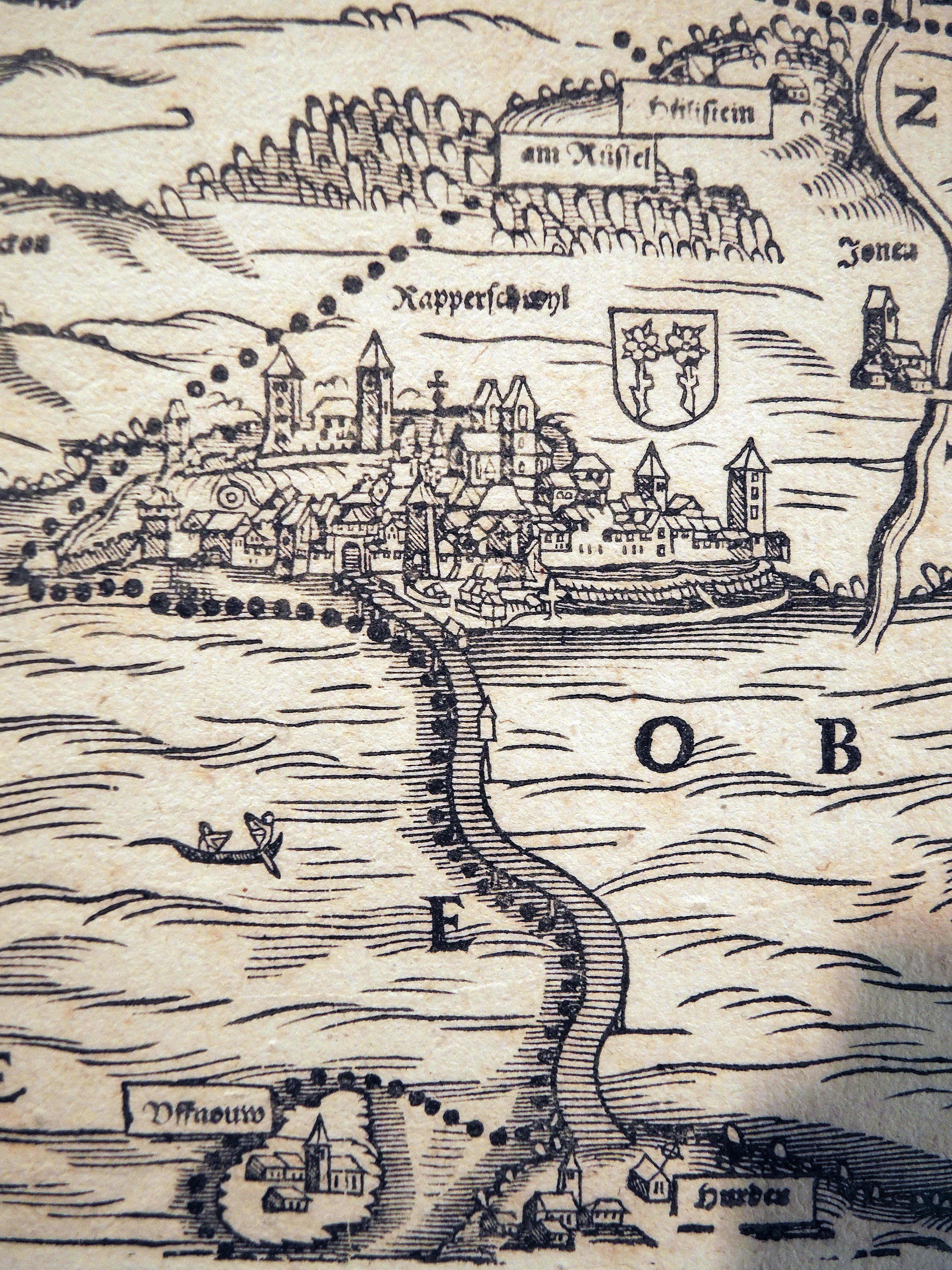 Das obere Zürichseegebiet um Rapperswil auf Jos Murers Karte des Zürcher Herrschaftsgebiets, mit der frühesten druckgrafischen Südansicht Rapperswils.